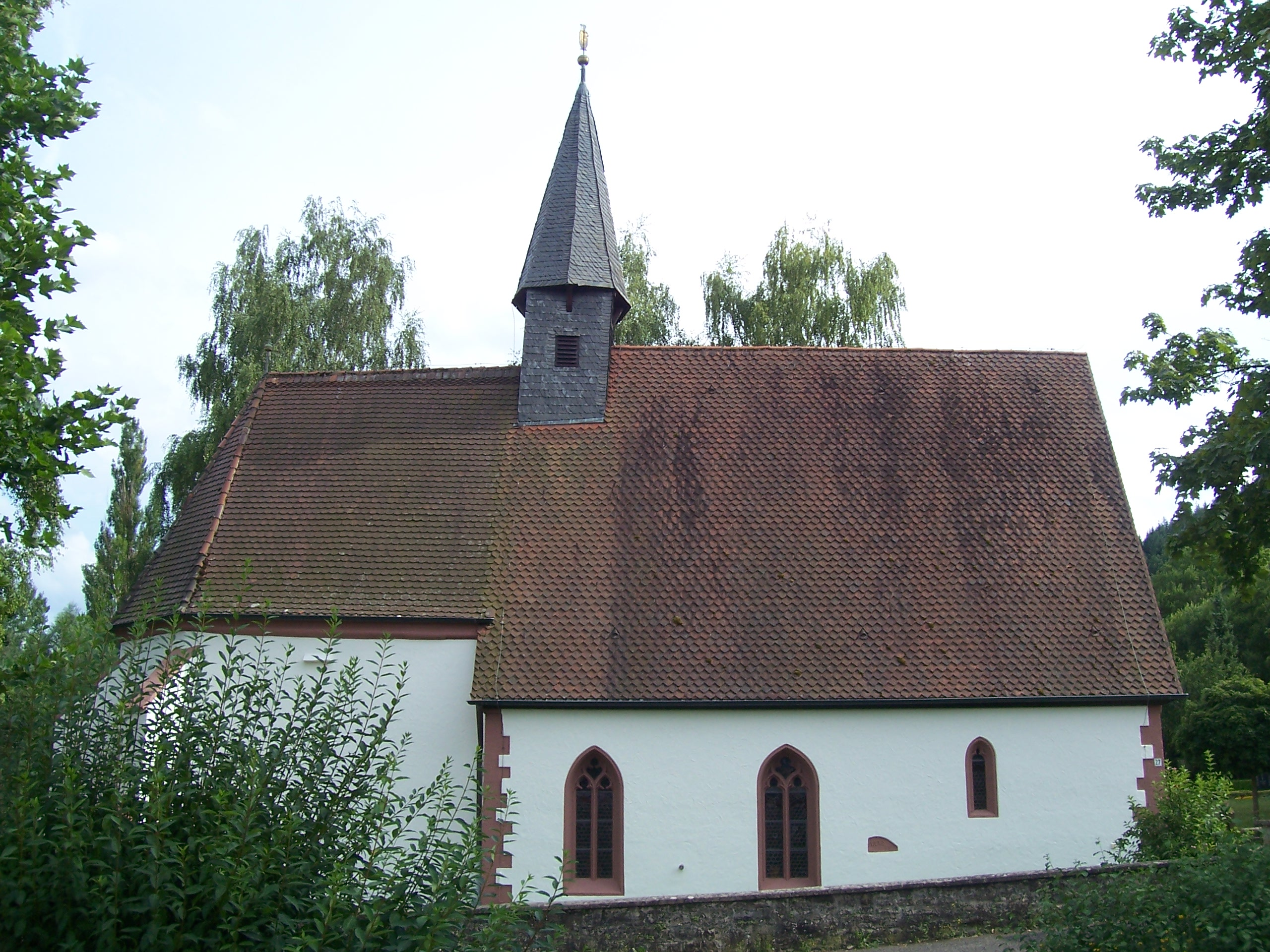 Wolfgangskapelle in Distelhausen (Tauberbischofsheim), erbaut 1472.